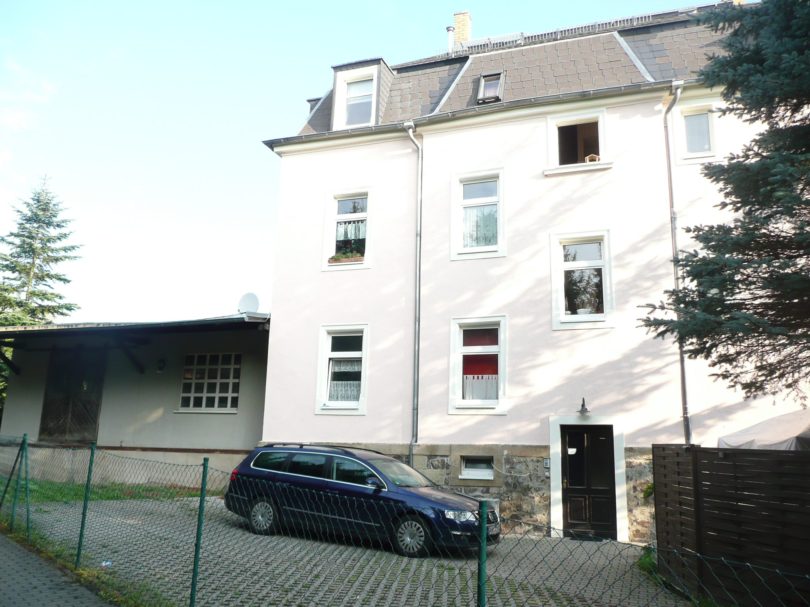 Bahnhofsgebäude des ehemaligen Bahnhofes Freital-Zauckerode